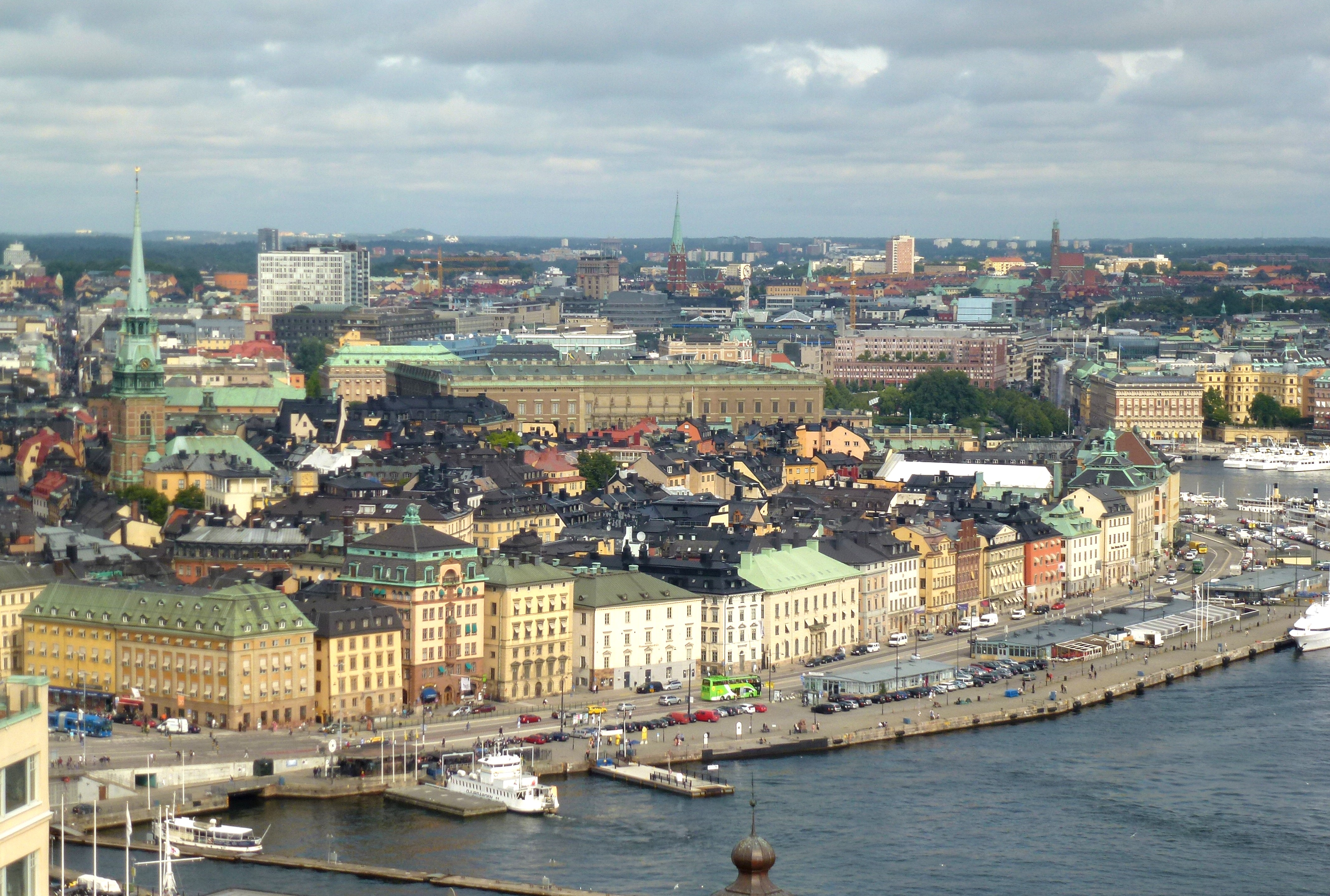 Utsikten från Katarina kyrkas torn över Gamla stan